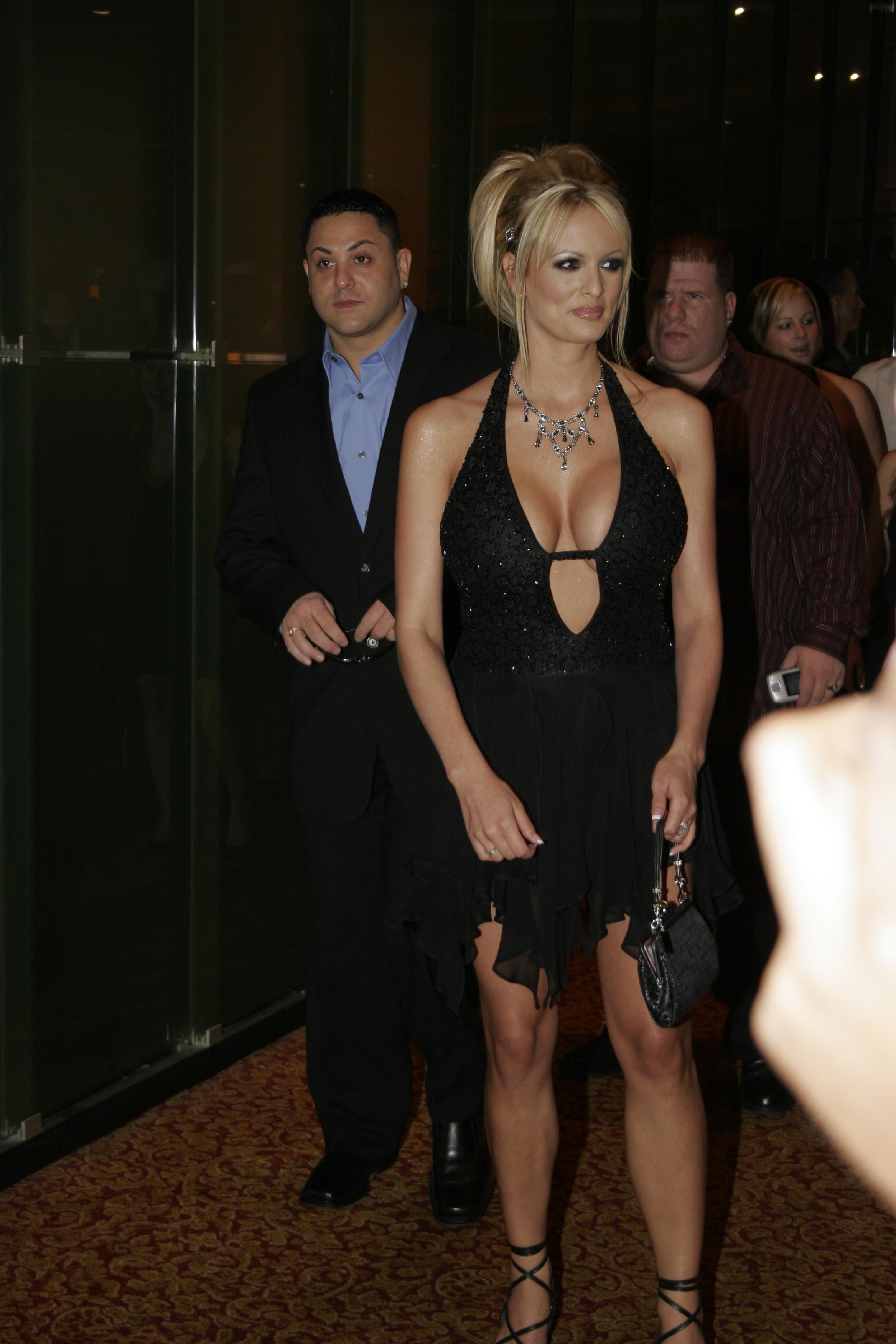 _MG_6294